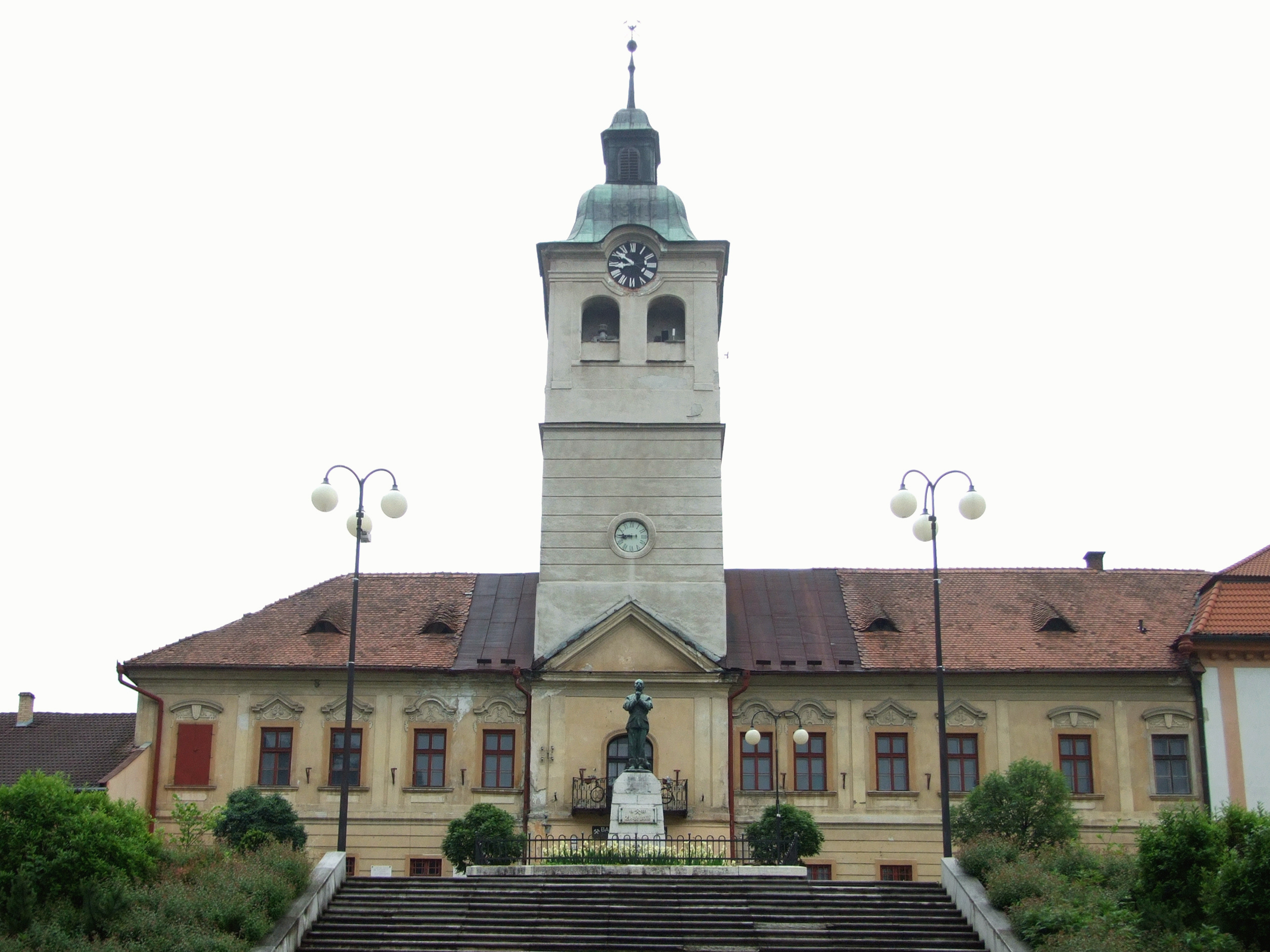 Radnica, 2.pol.18.st.